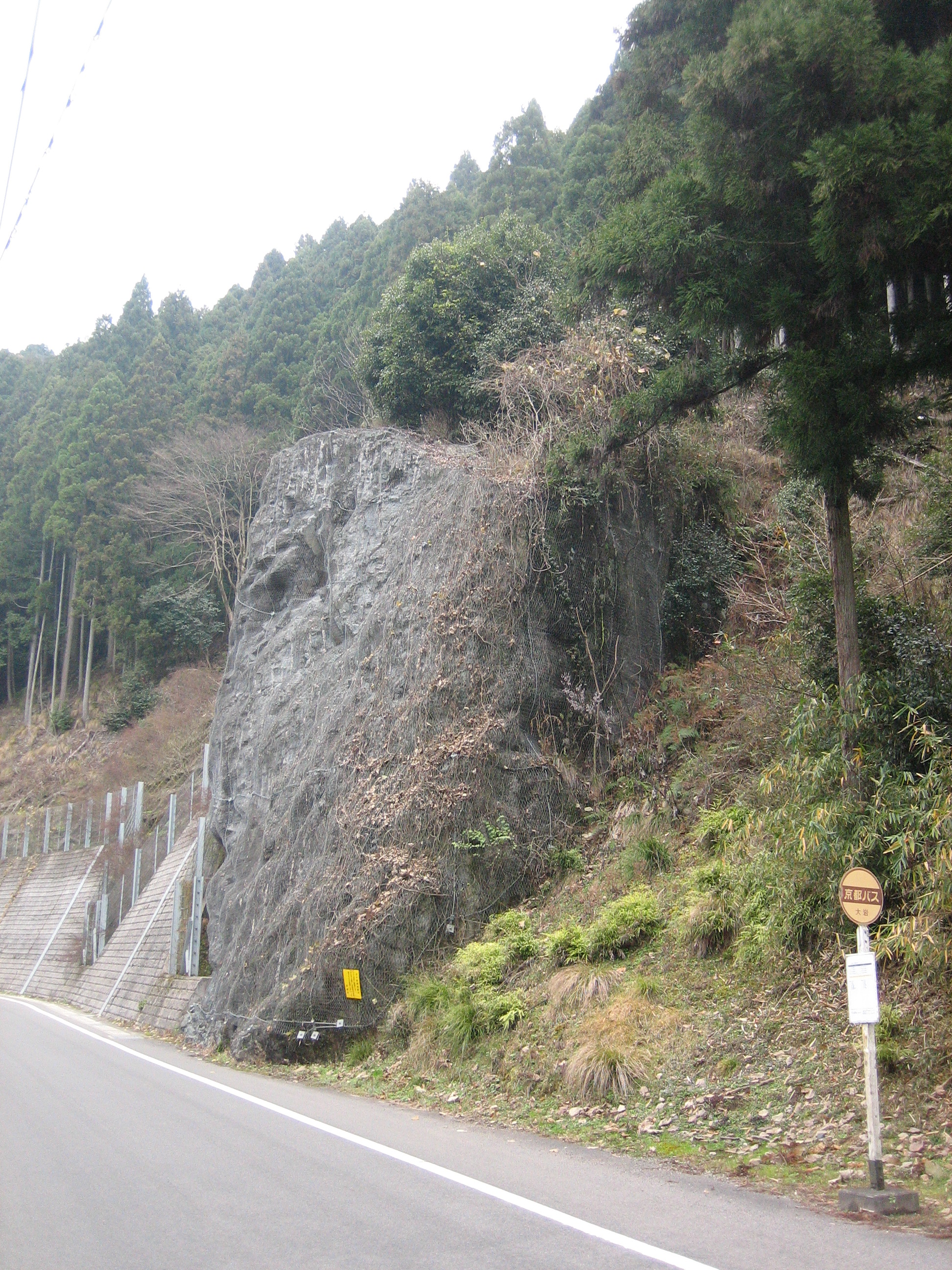 京都府道61号京都京北線を京都市左京区鞍馬二ノ瀬町から撮影